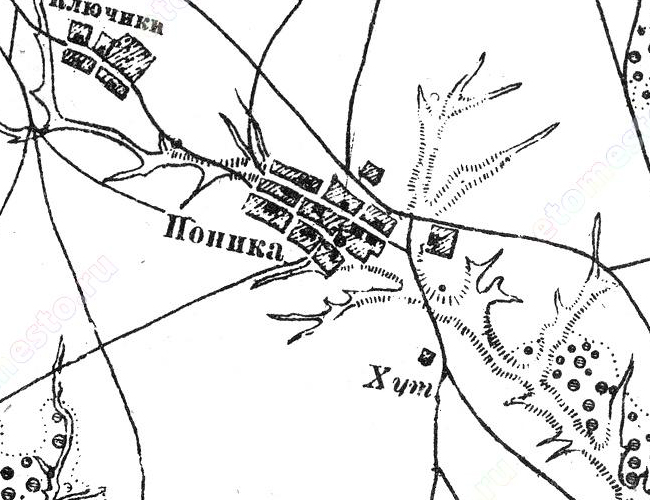 Село Поника на трёхвёрстной карте Шуберта Симбирской губернии 1870-1919 г..